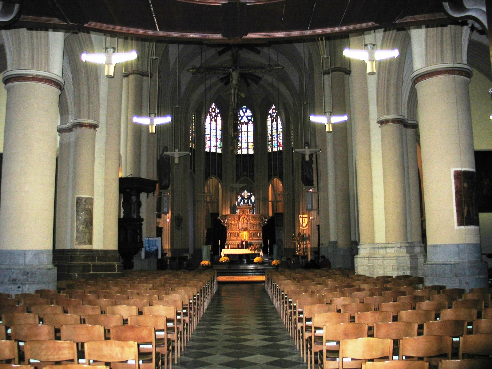 Interieur Sint-Quintinuskathedraal te Hasselt - eigen foto